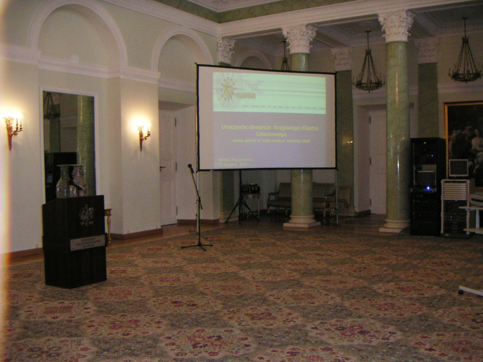 Sala Kolumnowa Pałacu Prezydenckiego na moment przed oficjalnym otwarciem Krajowego Klasrta Linuksowego CLUSTERIX.